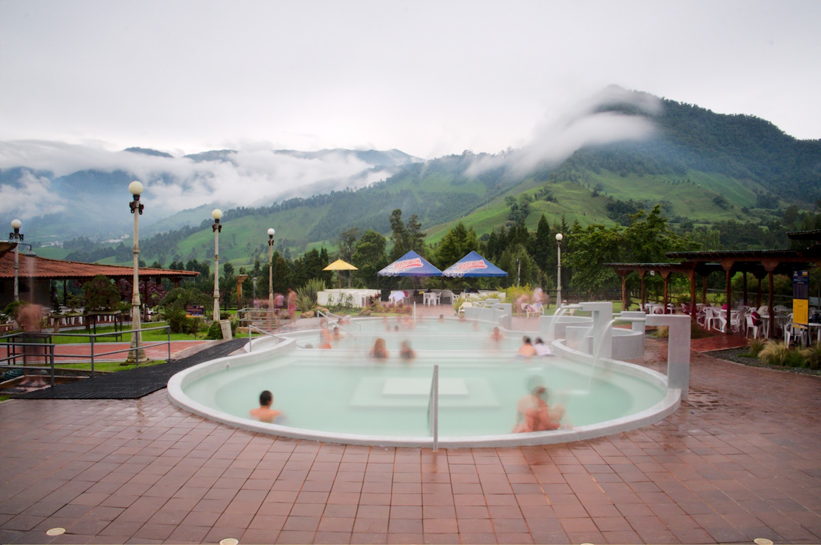 Esta fotografía fue tomada en el municipio colombiano con código 17873.